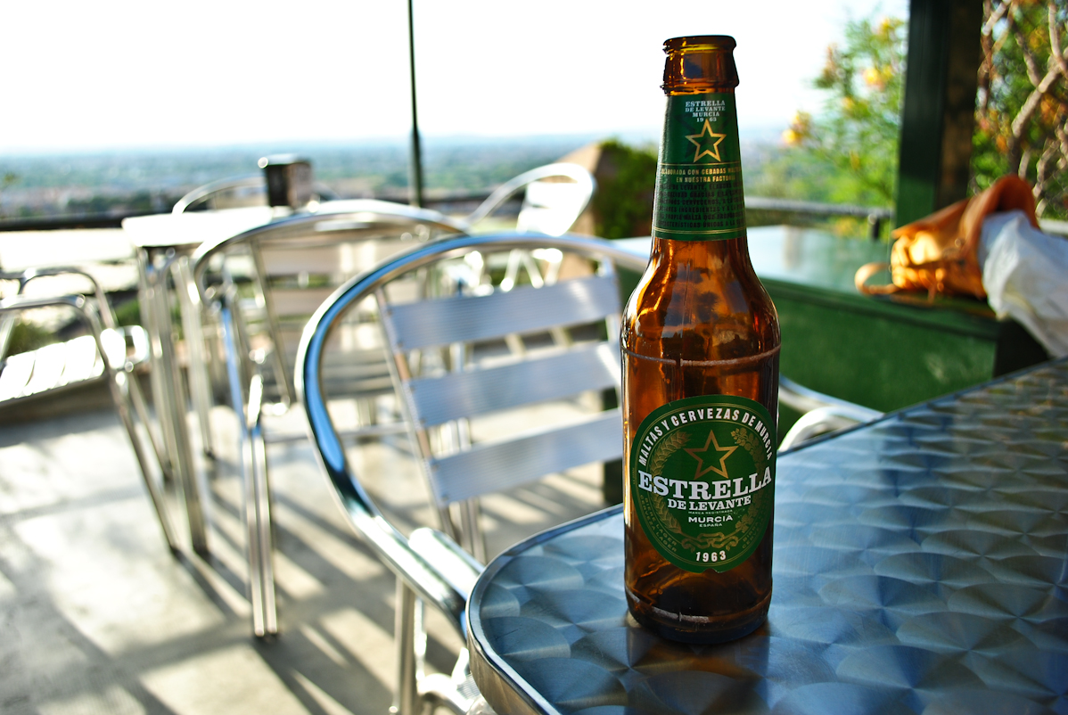 Un botellín de Estrella Levante, servido en un bar de Murcia.